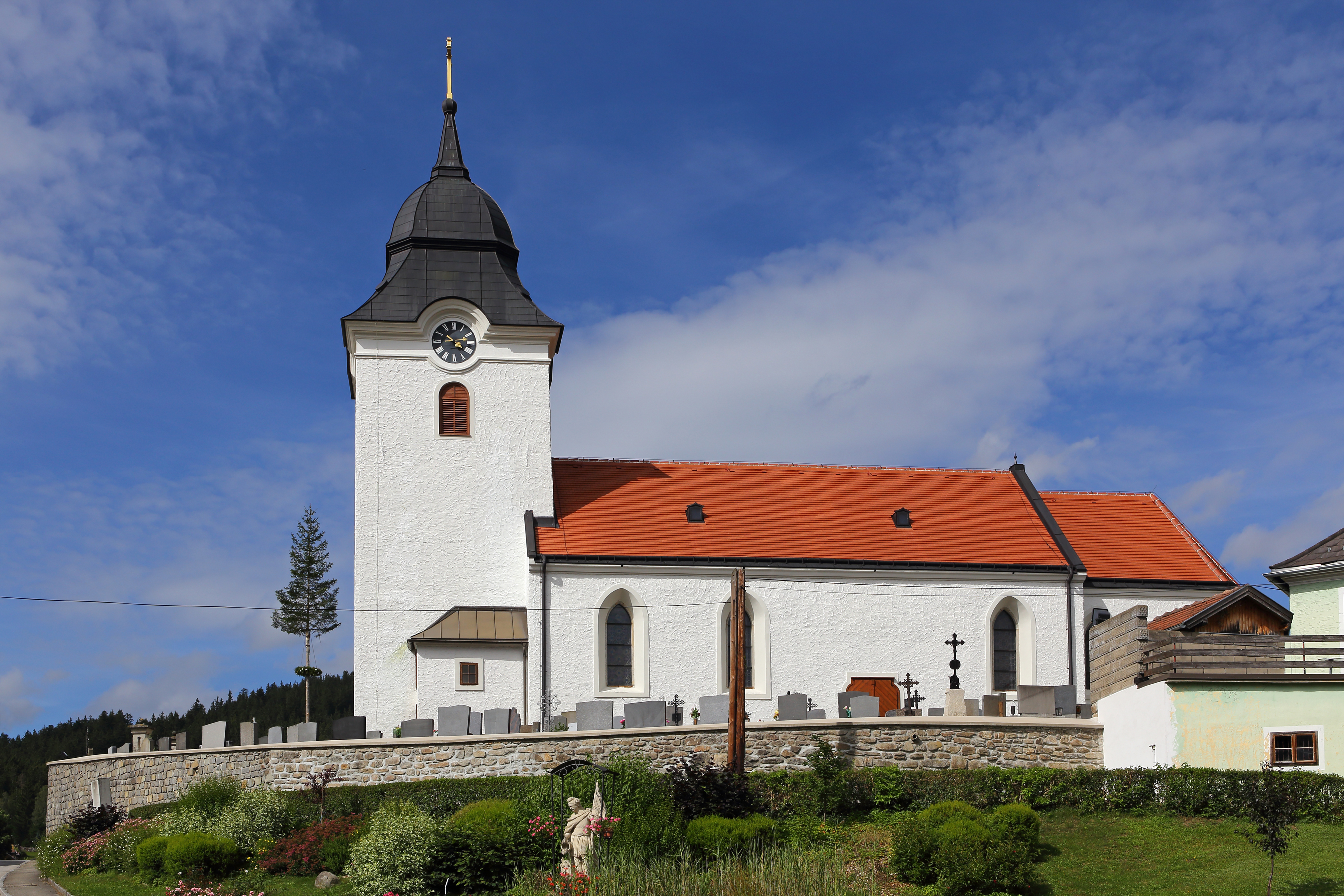 Kath. Pfarrkirche hl. Wenzel und Friedhof in Harmanschlag